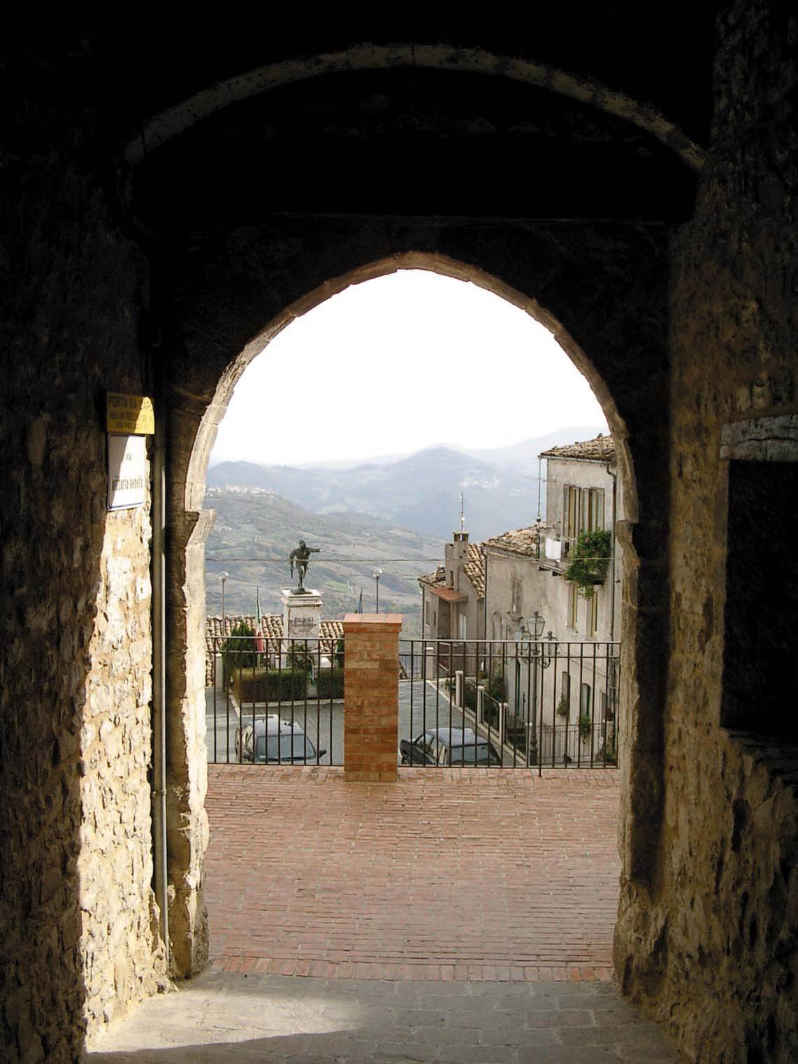 Palmoli (CH)